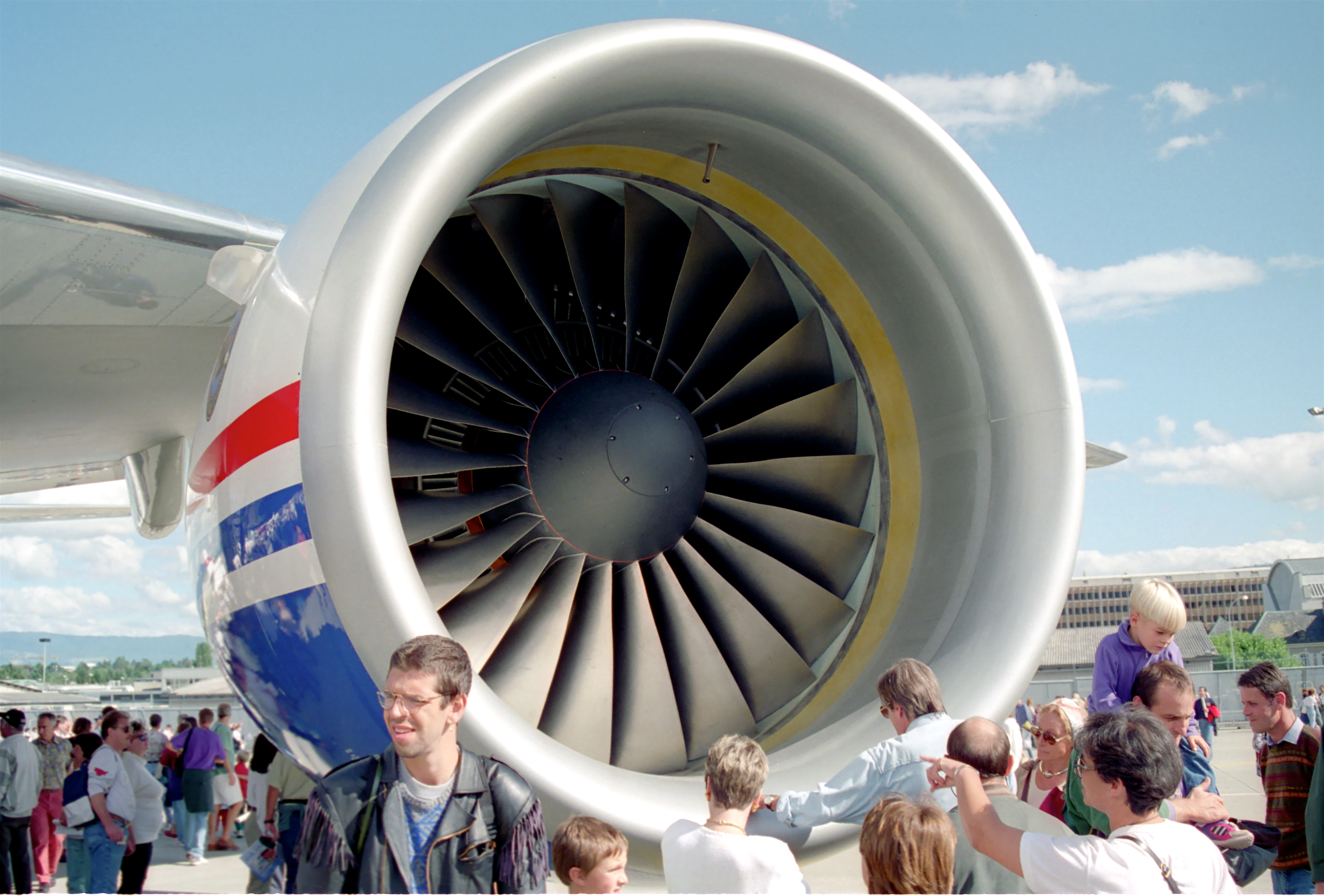 N7771@GVA;09.09.1995-engine